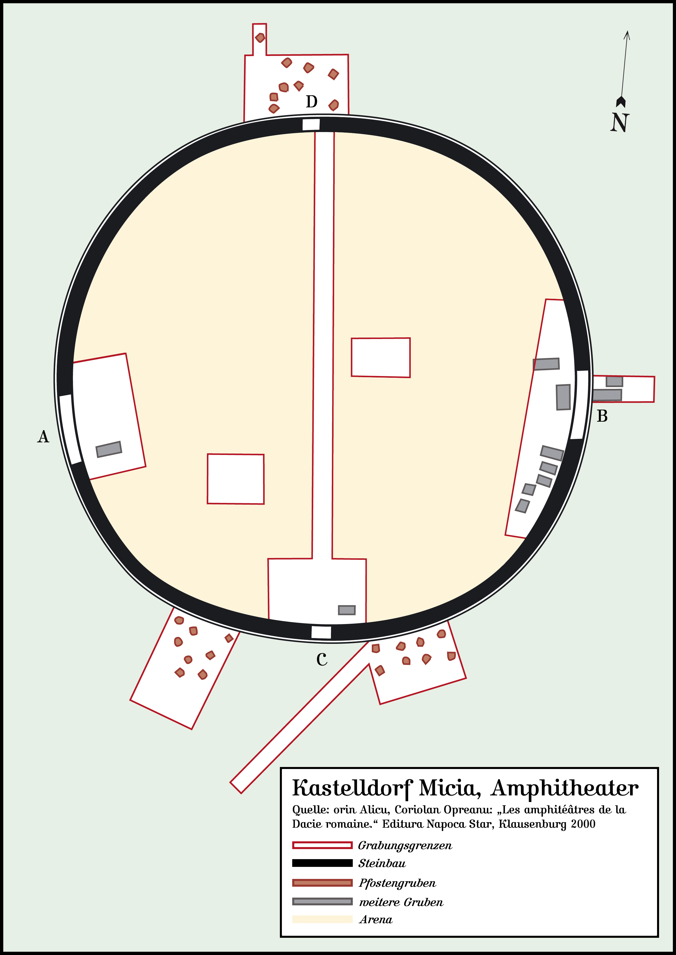 Witzel (Vețel): Kastell Micia, Siebenbürgen, Rumänien – Befundlage am Amphitheater.